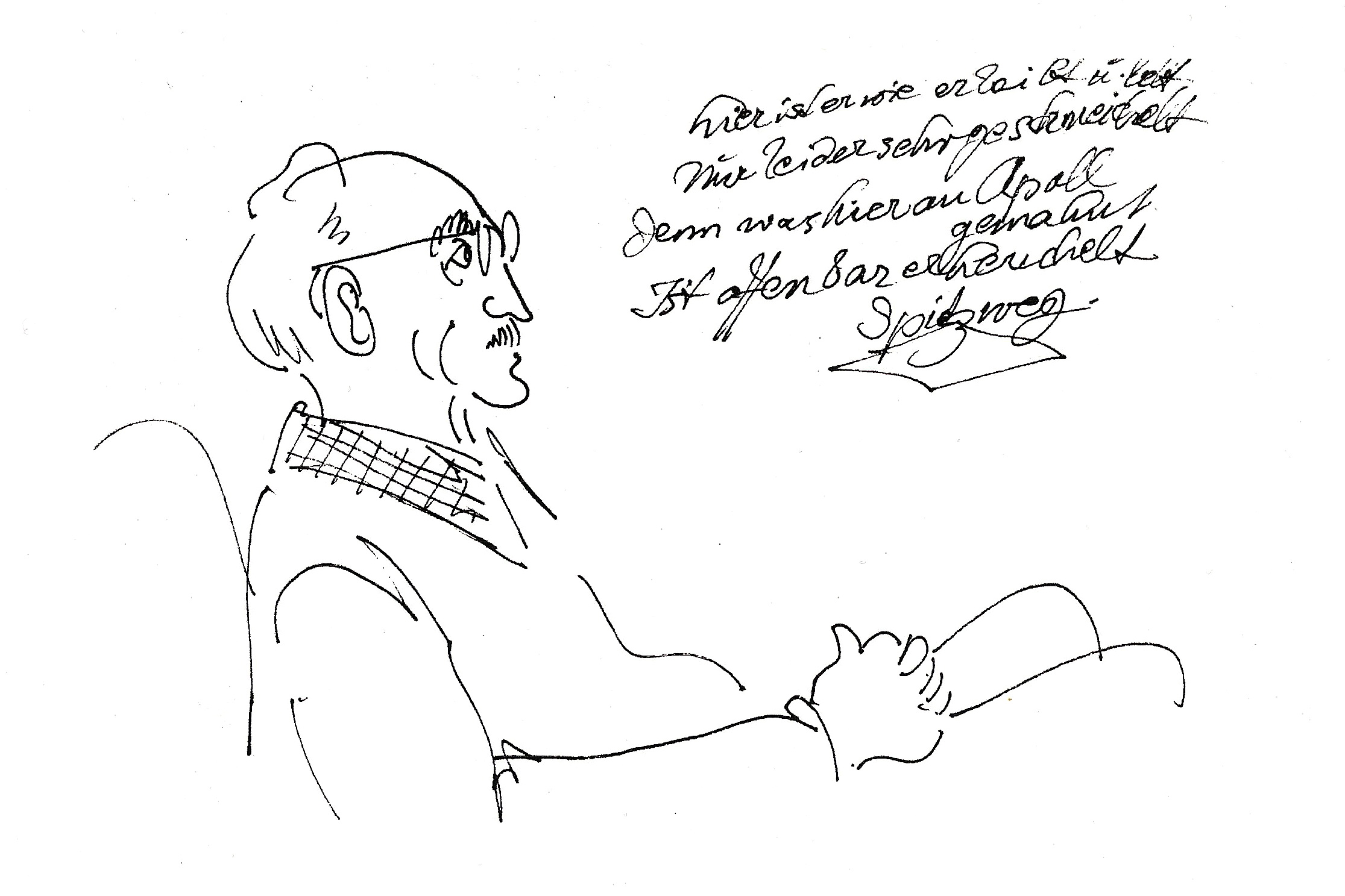 Diese Zeichnung wurde im Sommer 1980 anlässlich der Buchpräsentation über Jakob Roider mit Illustrationen von Josef Oberberger angefertigt. Das Zitat von Spitzweg fügte Marxmüller handschriftlich an.